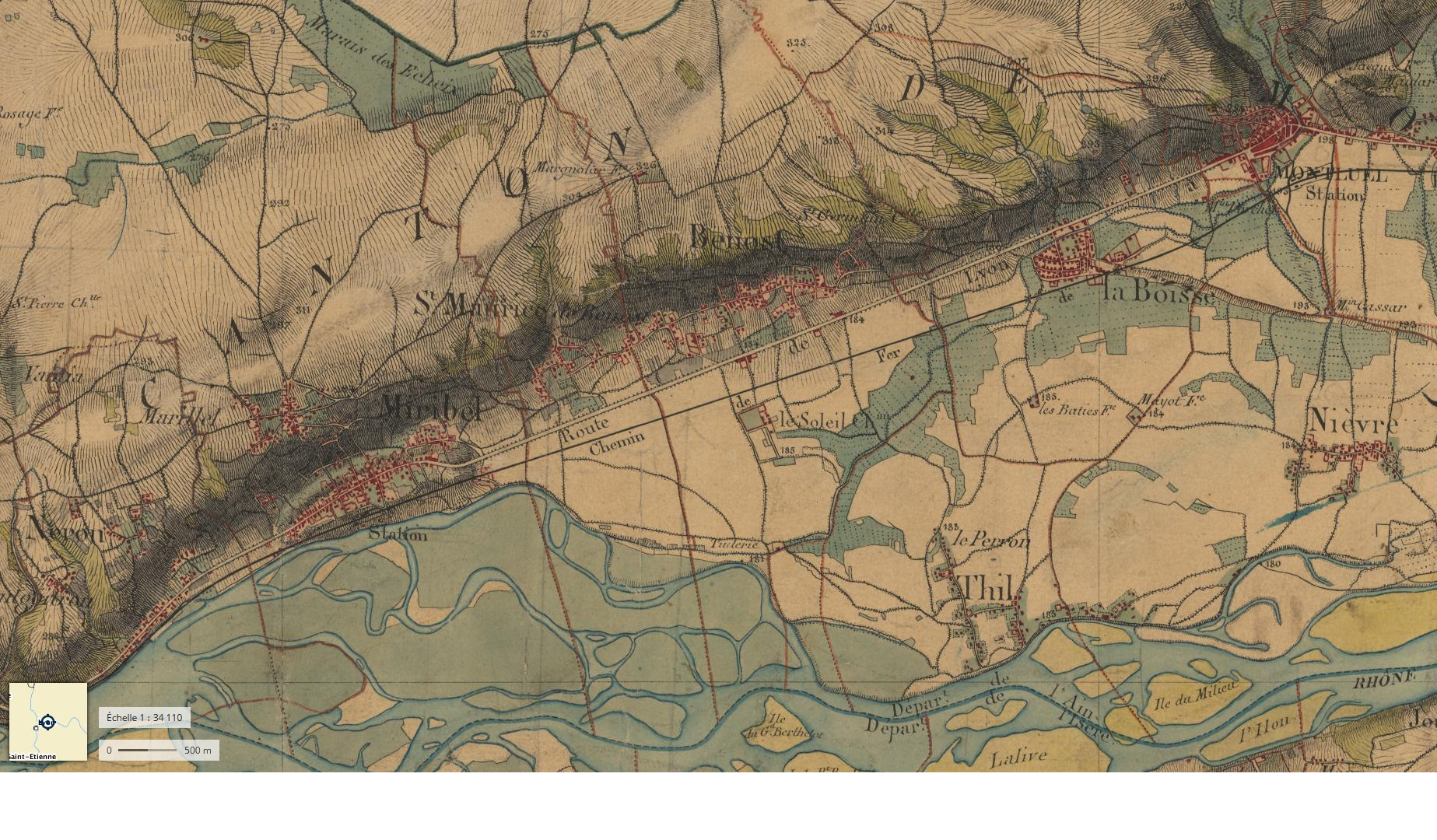 Échelle initiale: 1/80 000 Échelle du détail: 1/34 110